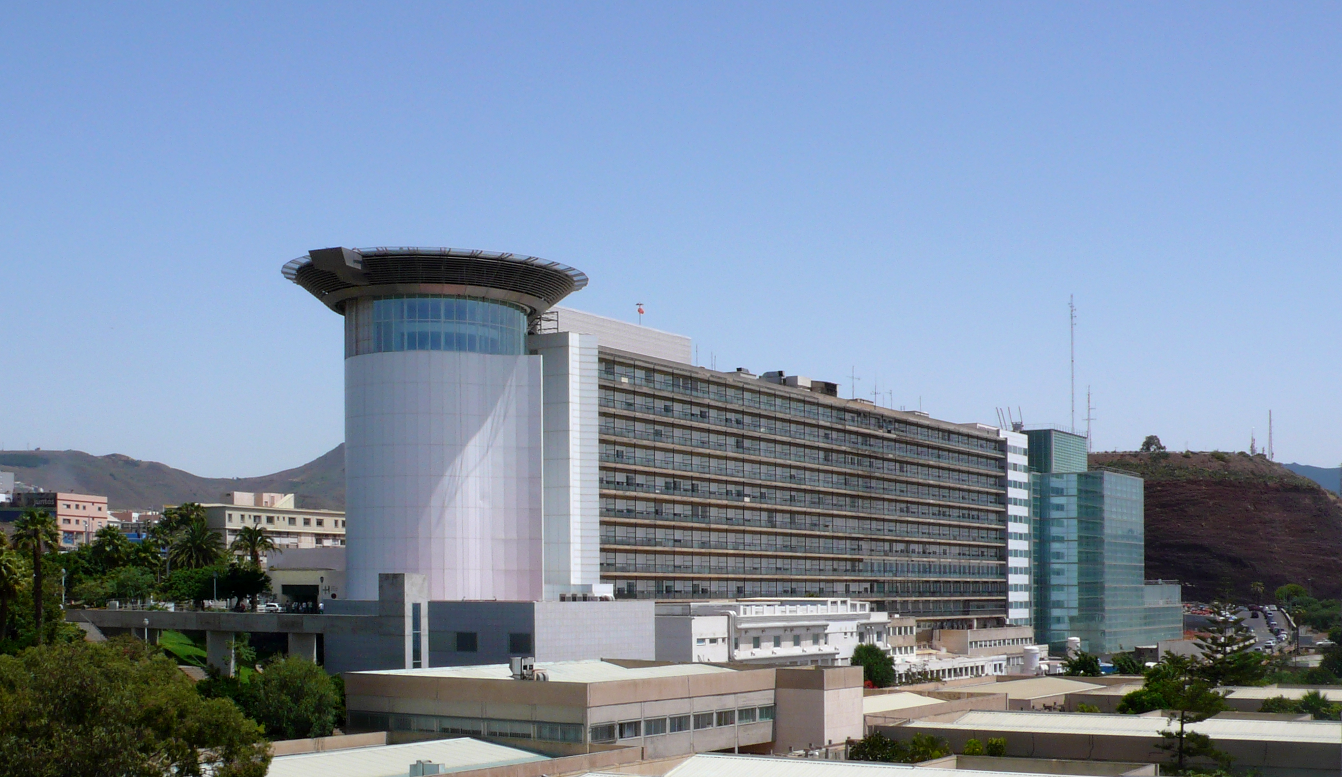 Vista general del Hospital Universitario de Canarias, en Tenerife. Junto a él, la Facultad de Medicina de la Universidad de La Laguna.